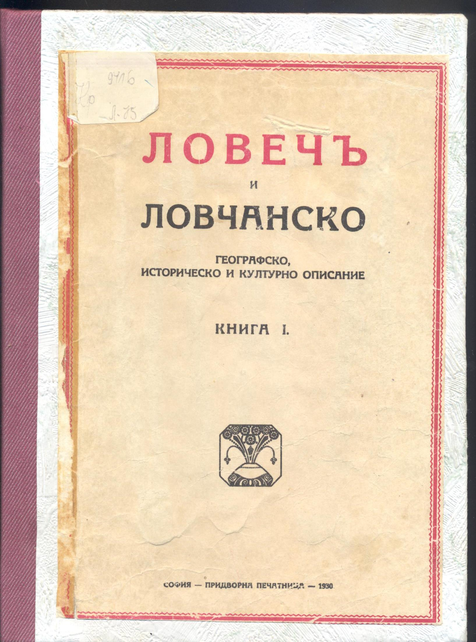 Факсимиле на корицата на Ловеч и Ловчанско, книга 1, 1930.